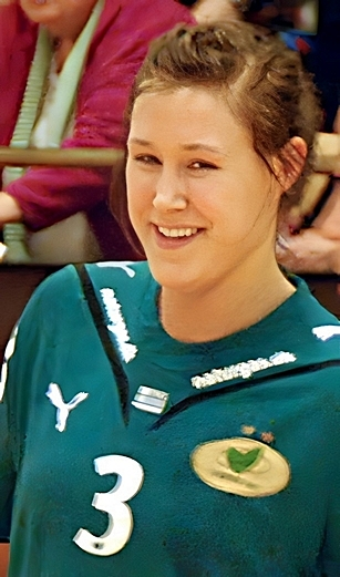 Den norske håndboldspiller Marit Malm Frafjord.